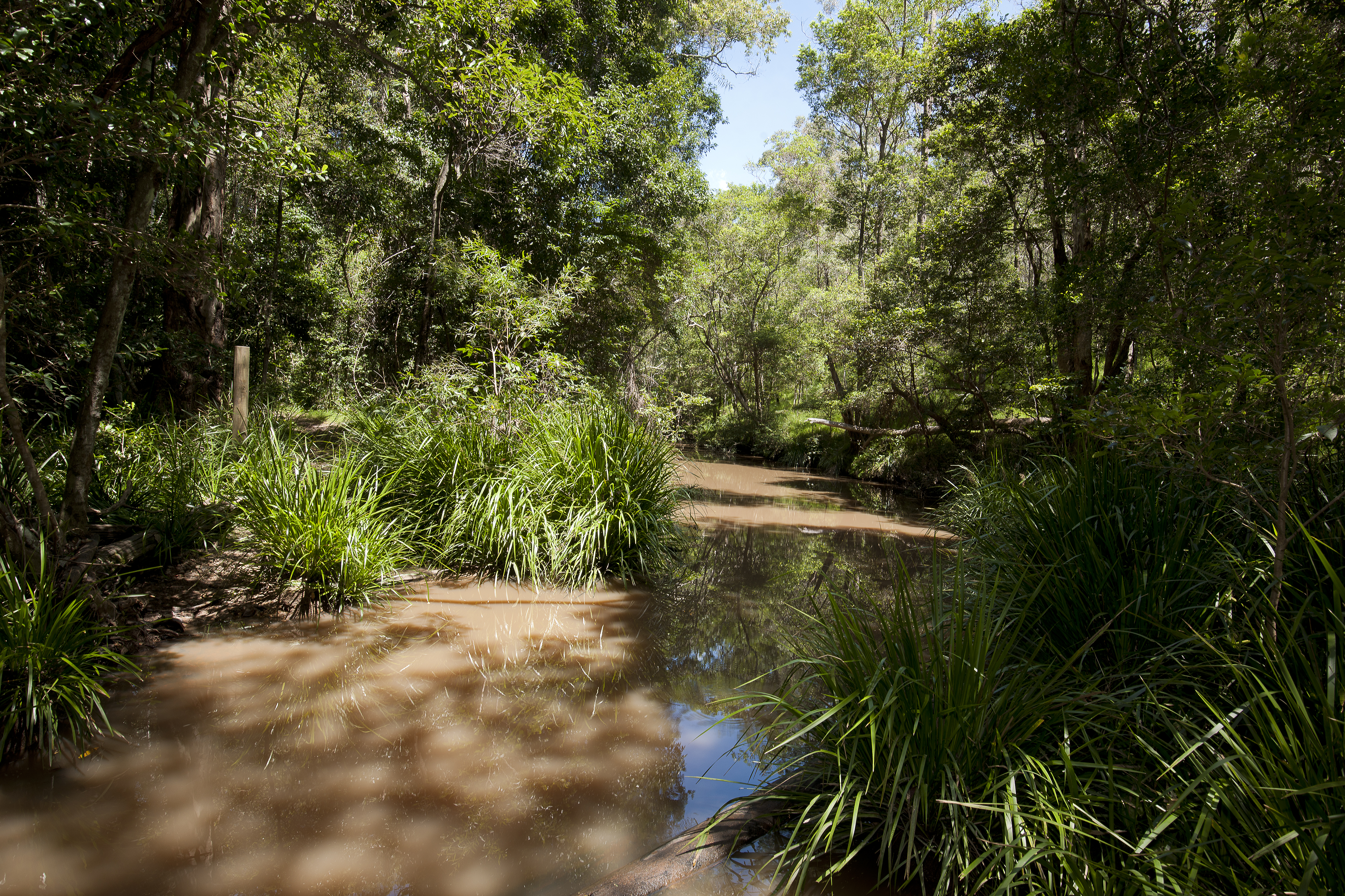 Brisbane Koala Bushlands